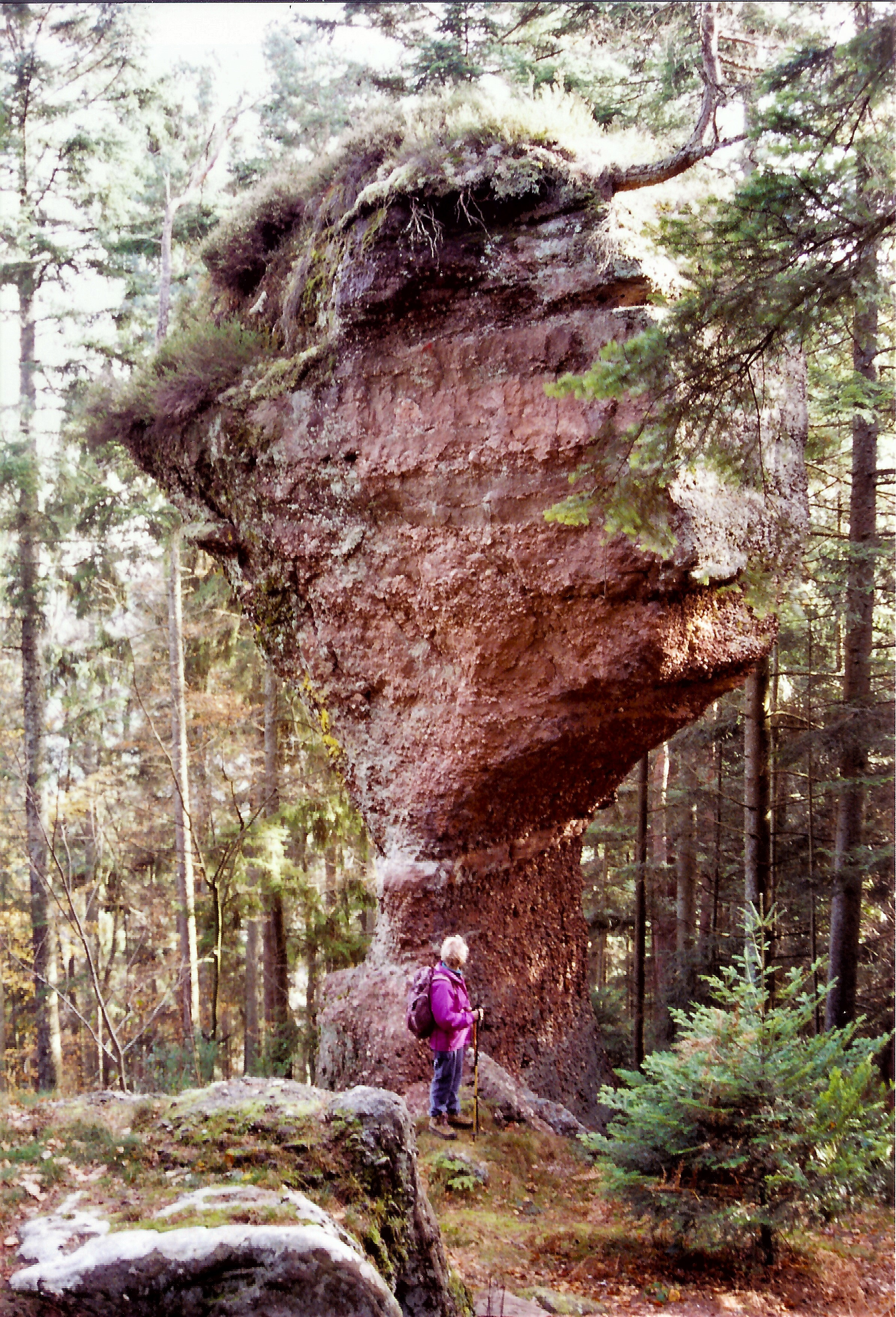 Rocher nommé pierre trois jambes. Taintrux. Vosges.